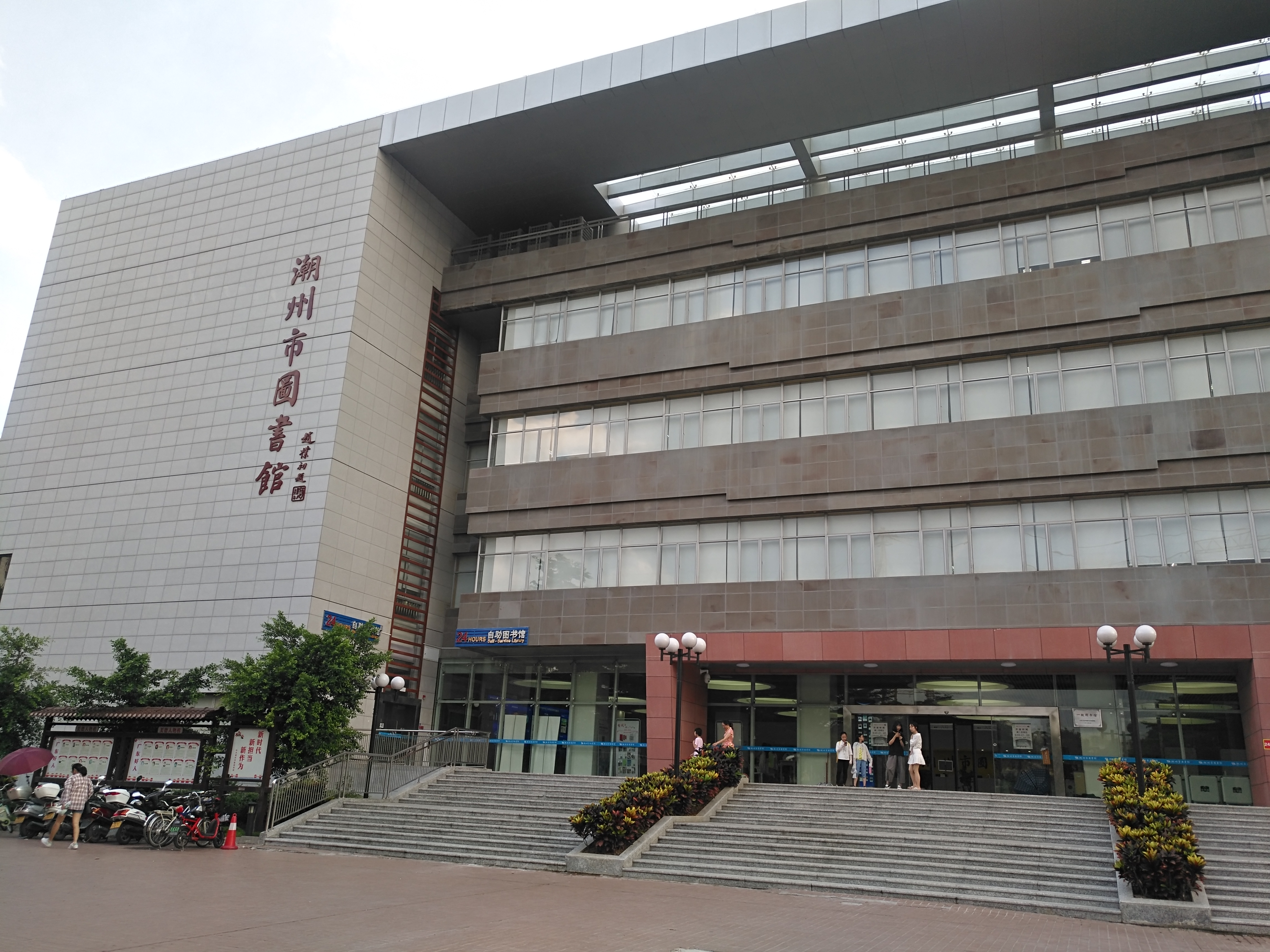 潮州市图书馆大楼，位于湘桥区潮州大道中段